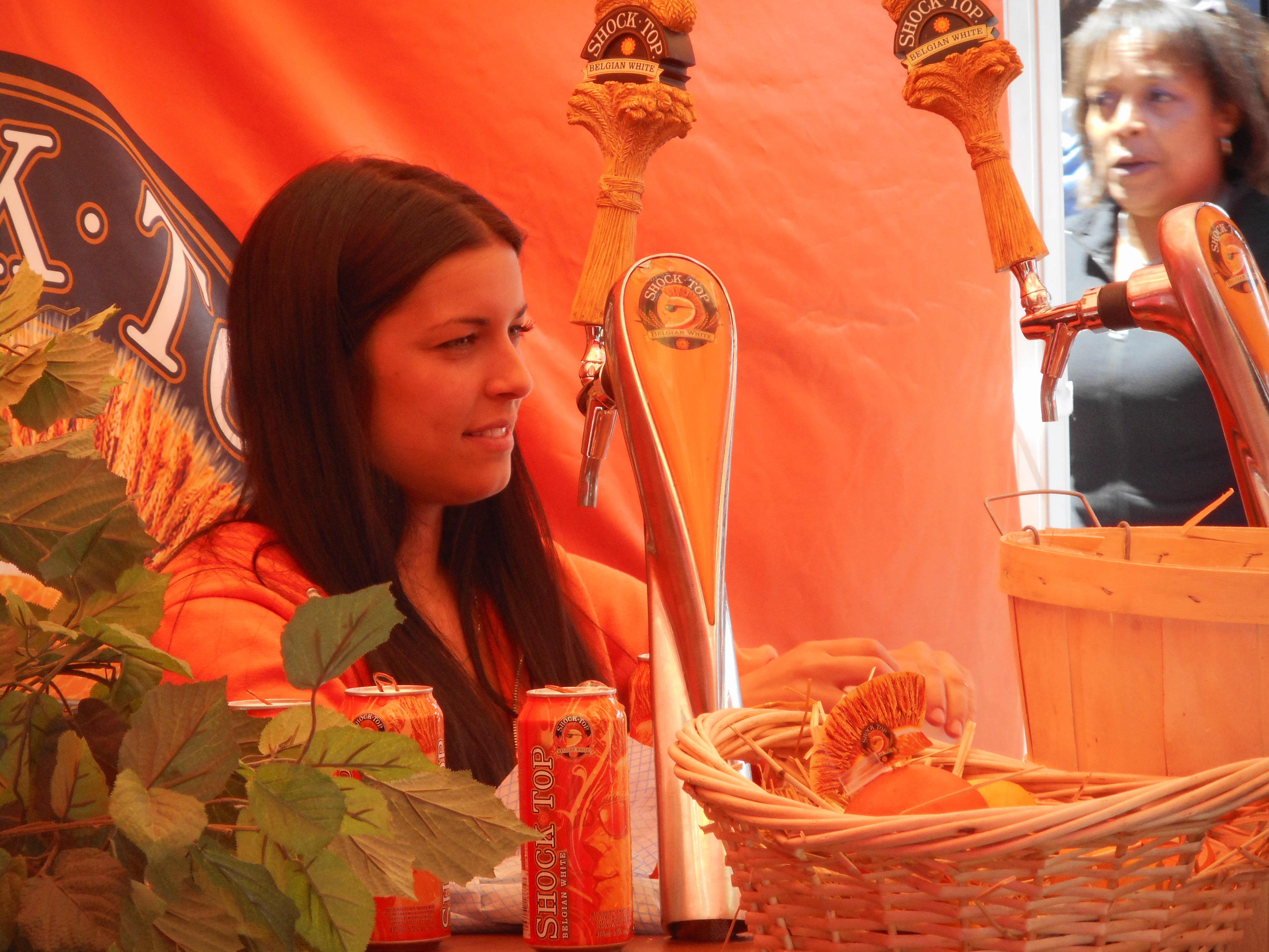 Festival du Grand Prix à Montréal pendant le Grand Prix du Canada